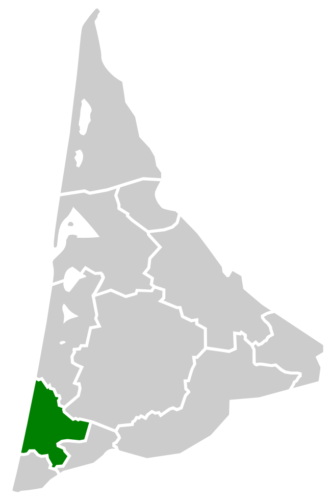 Localisation du Marensin